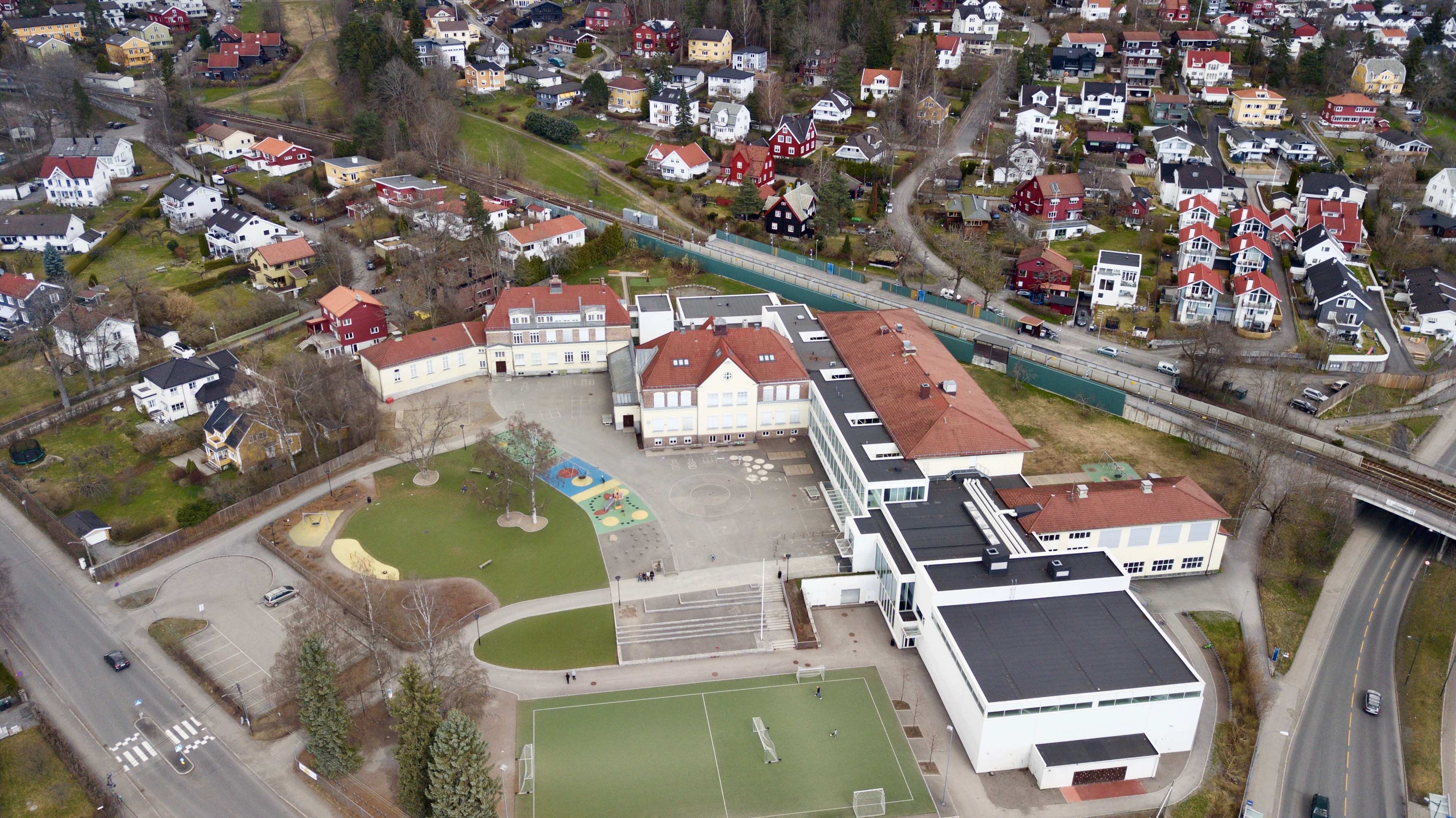 Tåsen skole i Oslo.